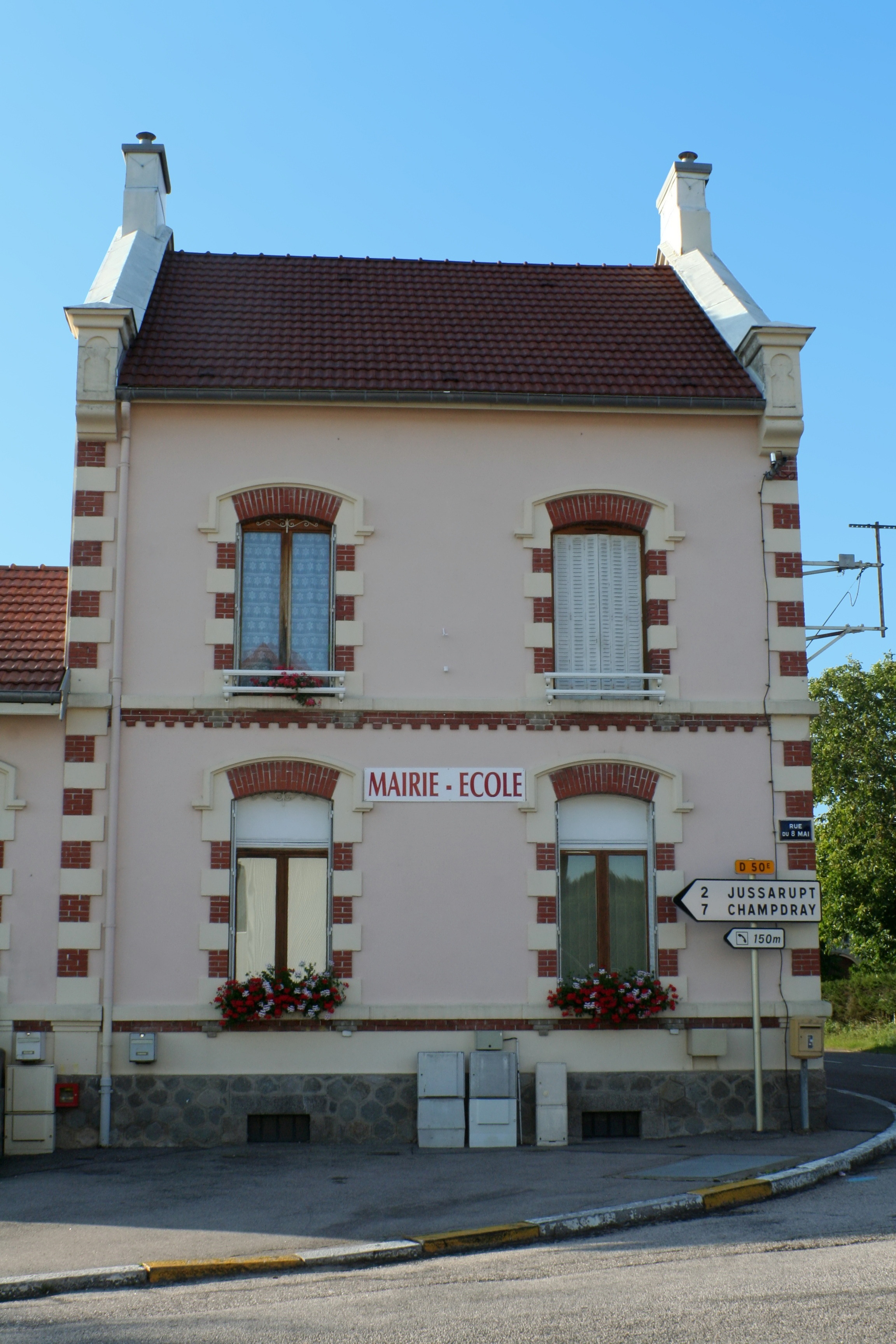 Mairie d'Aumontzey (Vosges)